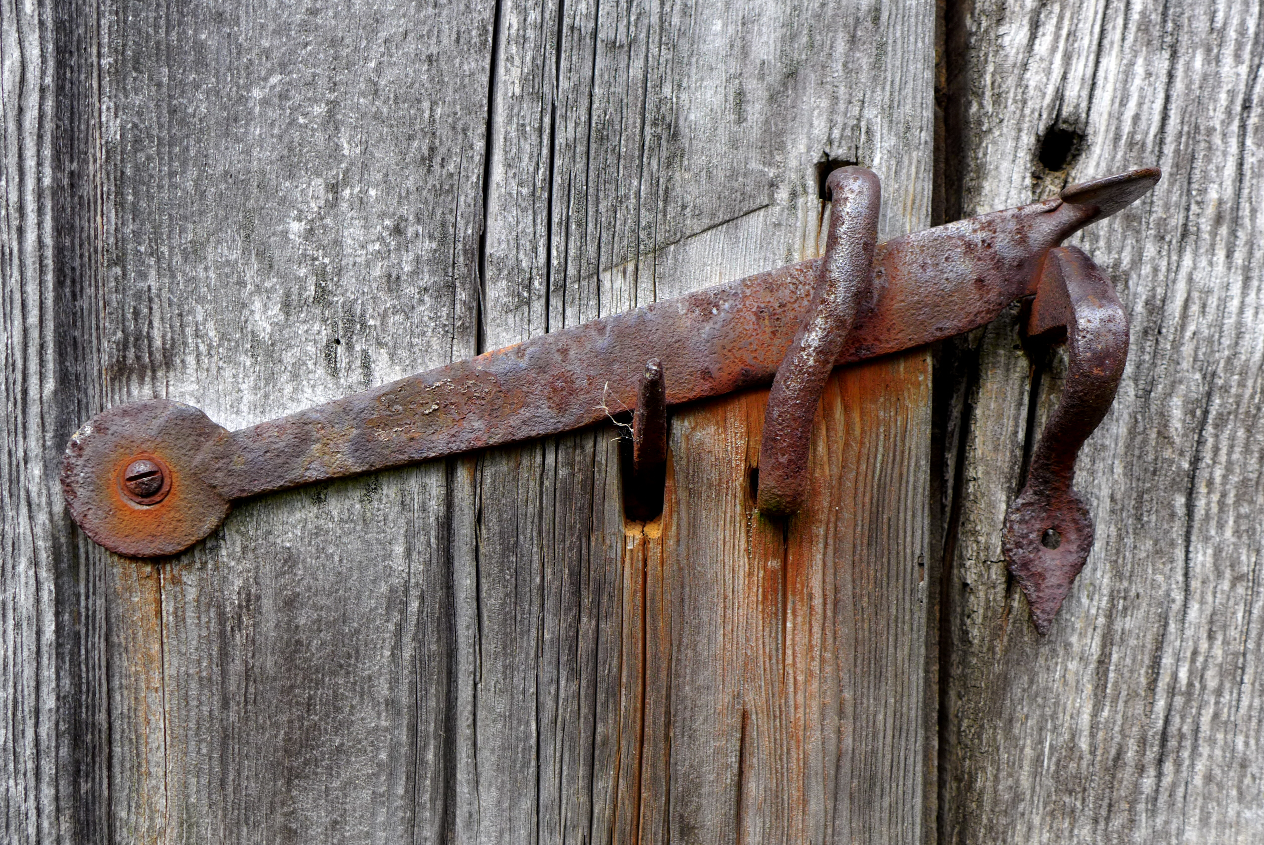 Rostige Verriegelung einer Stalltür in Deutschland.